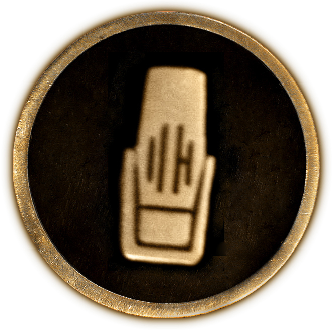 Symbol der Kategorie Radio (radio) der Sterne auf dem Hollywood Walk of Fame.